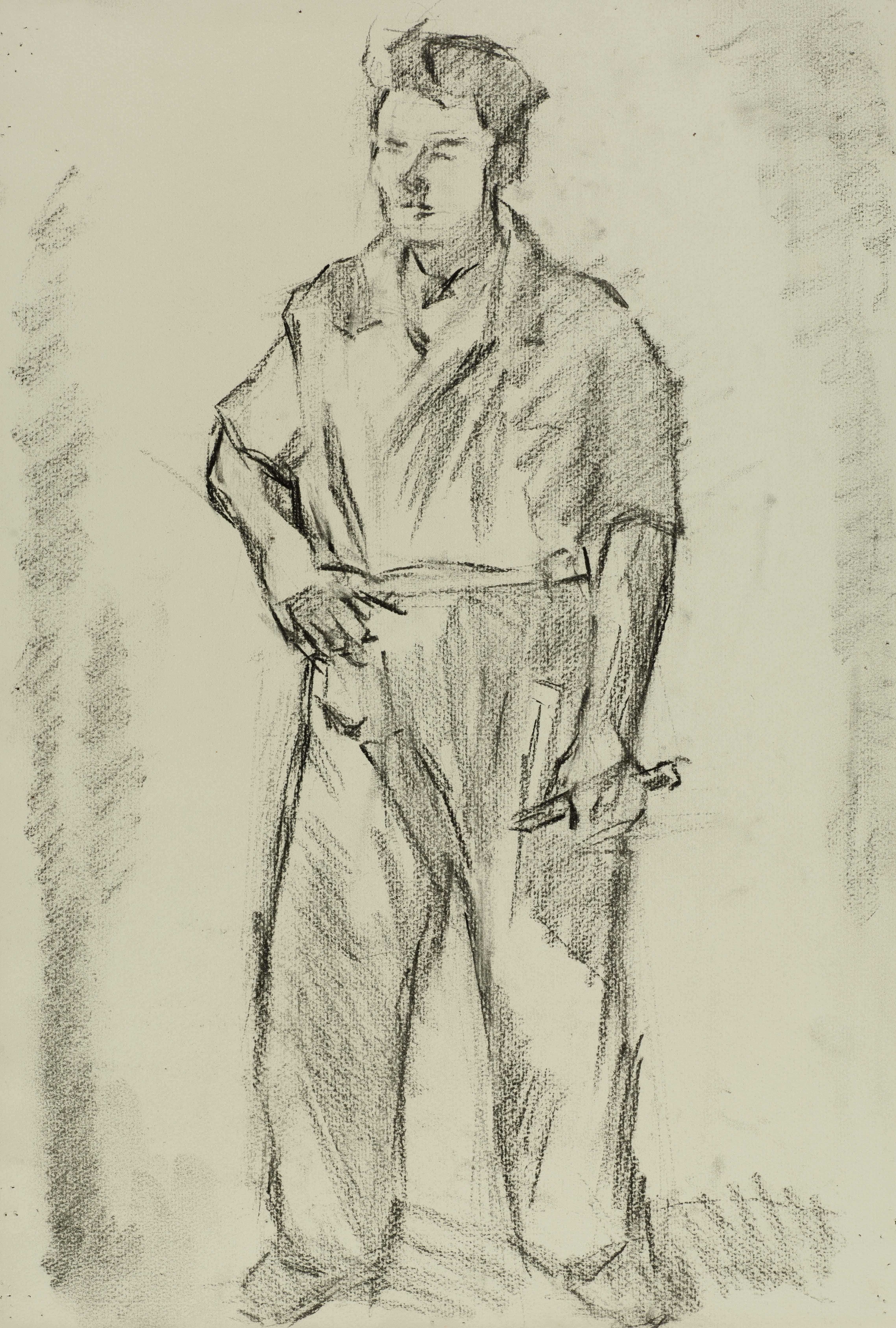 Fabriksarbeiter II: 60er Jahre 52,6x36,2; Kohle